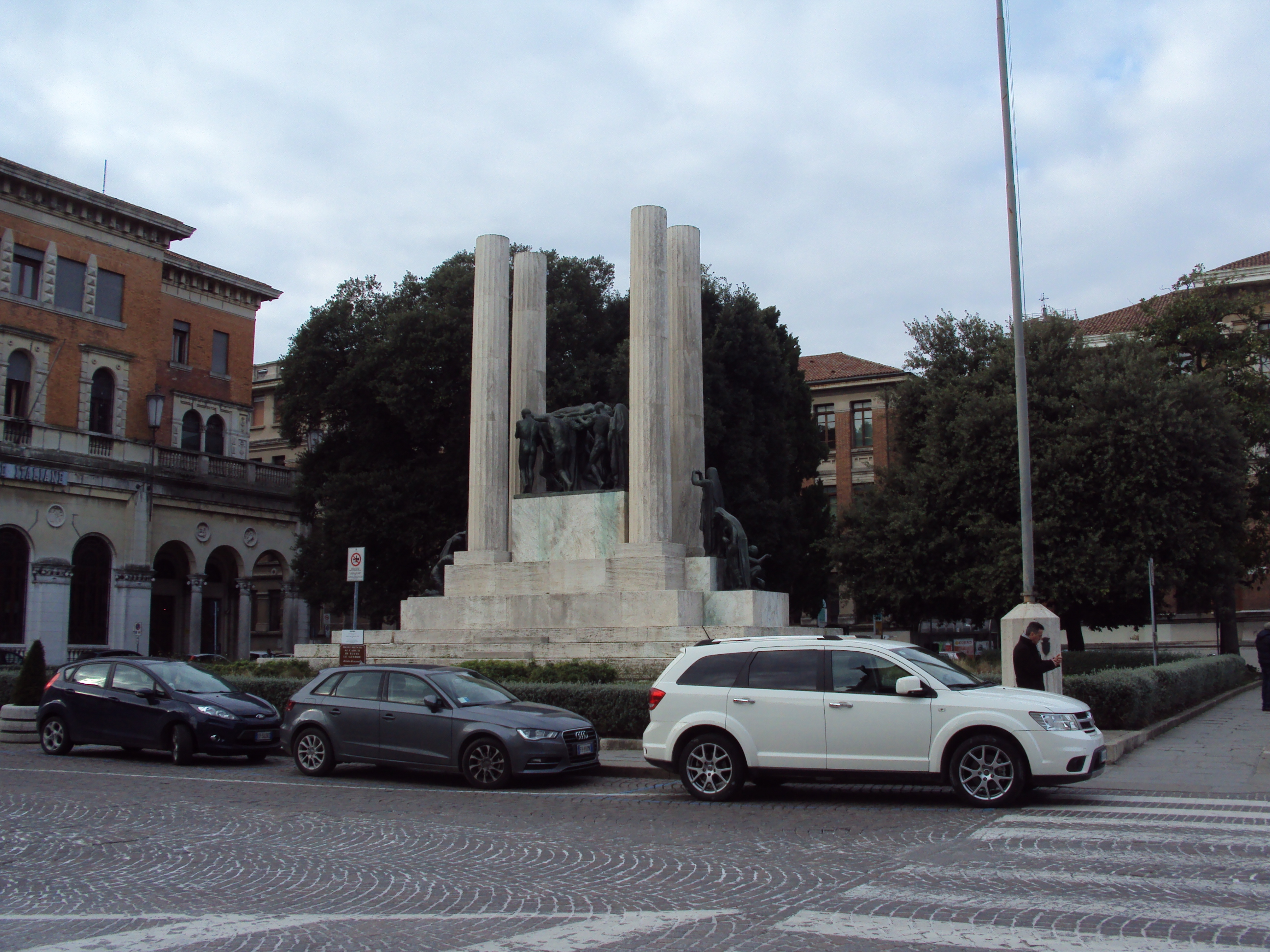 Veduta panoramica del monumento